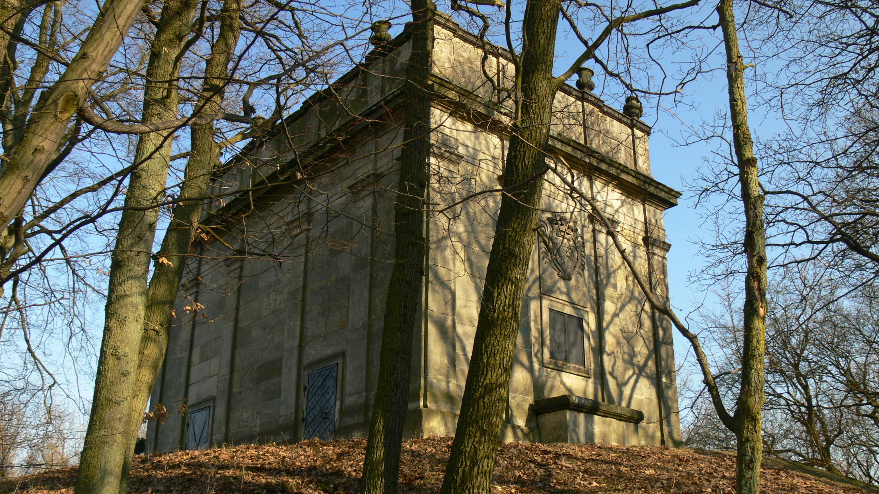 Loreta - kaple P. Marie (Hlásná Lhota), 1 km na západ od Podhradí, Hlásná Lhota